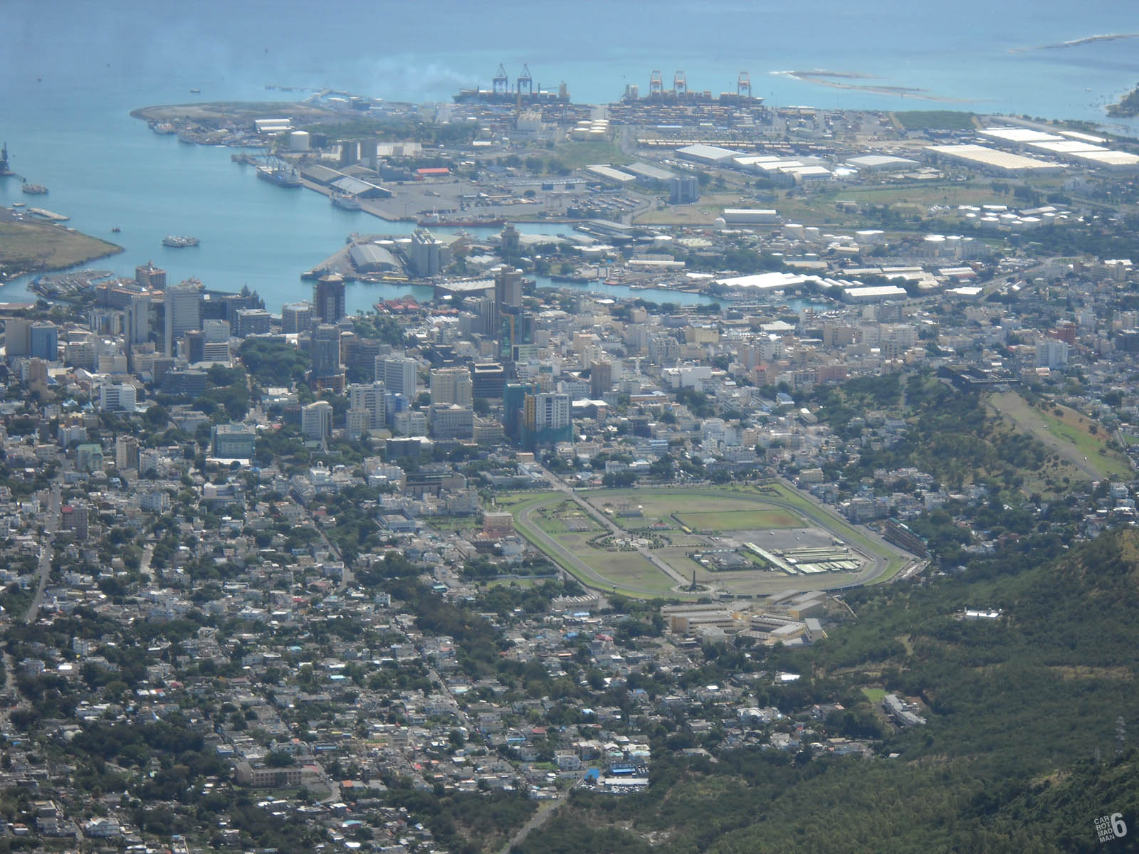 DSCN3565_2